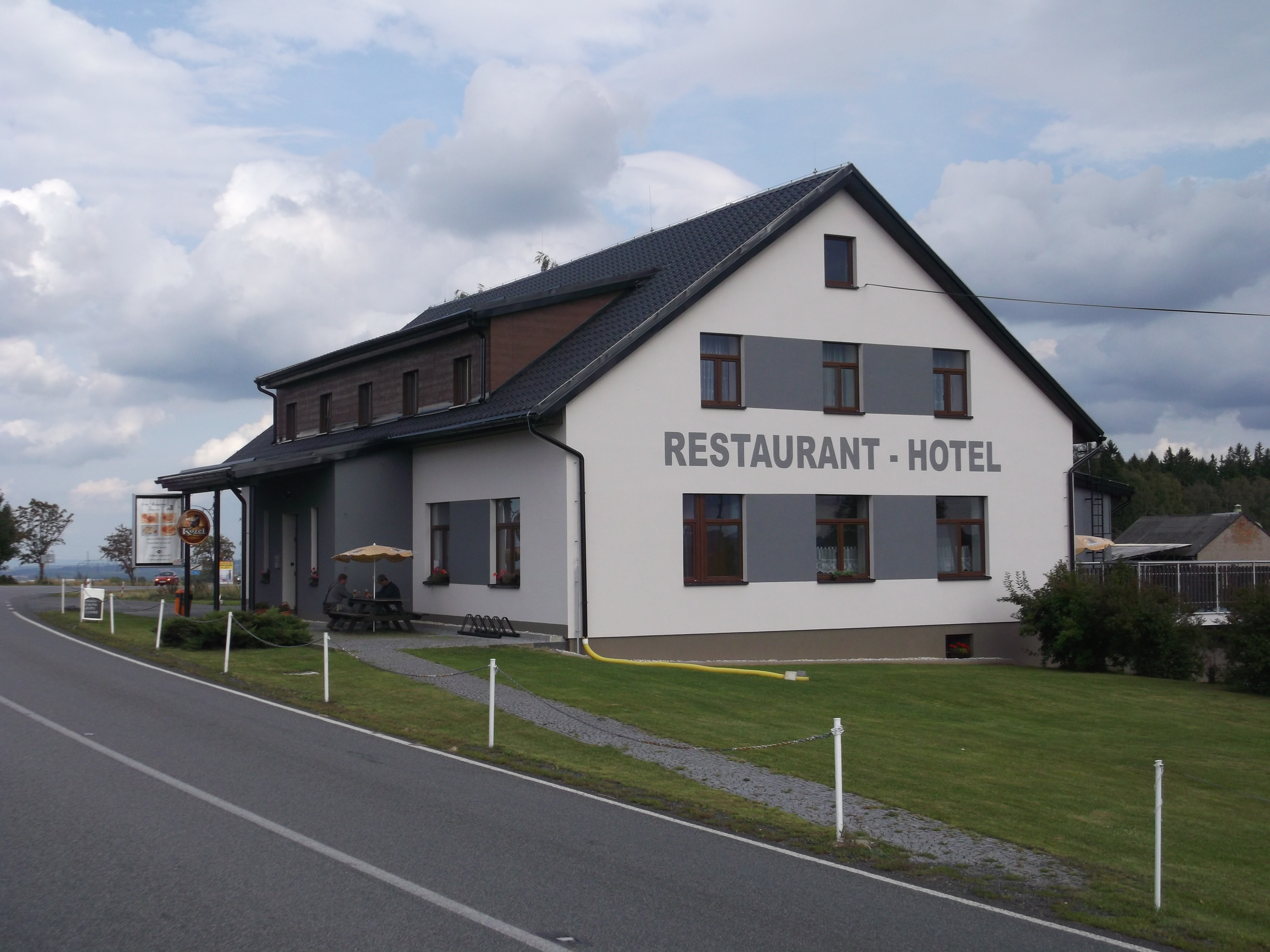 Medkovy Kopce - hotel (č.p. 17)